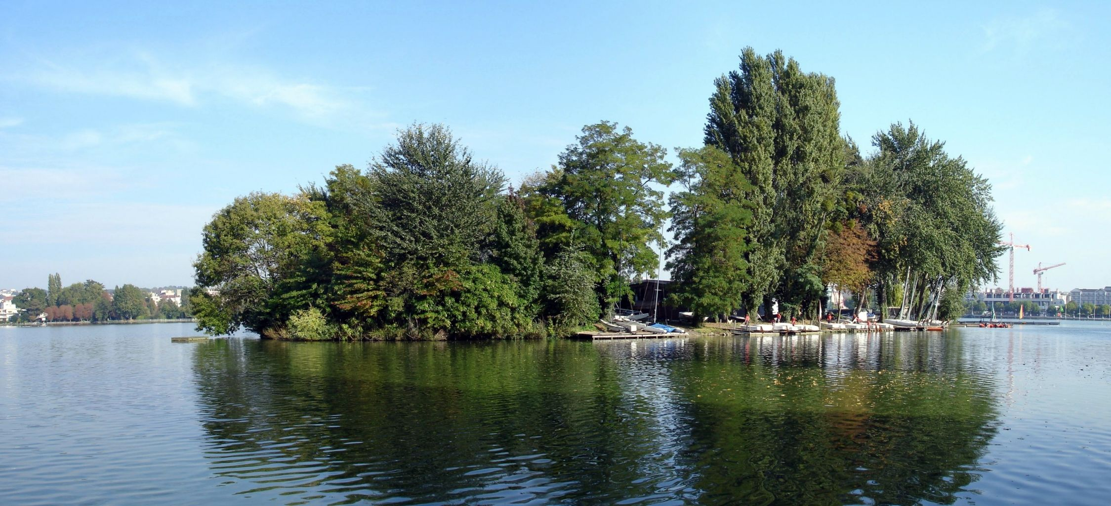 Ile des cygnes à Enghien-les-Bains (France) - Octobre 2005 Photo personnelle de clicsouris